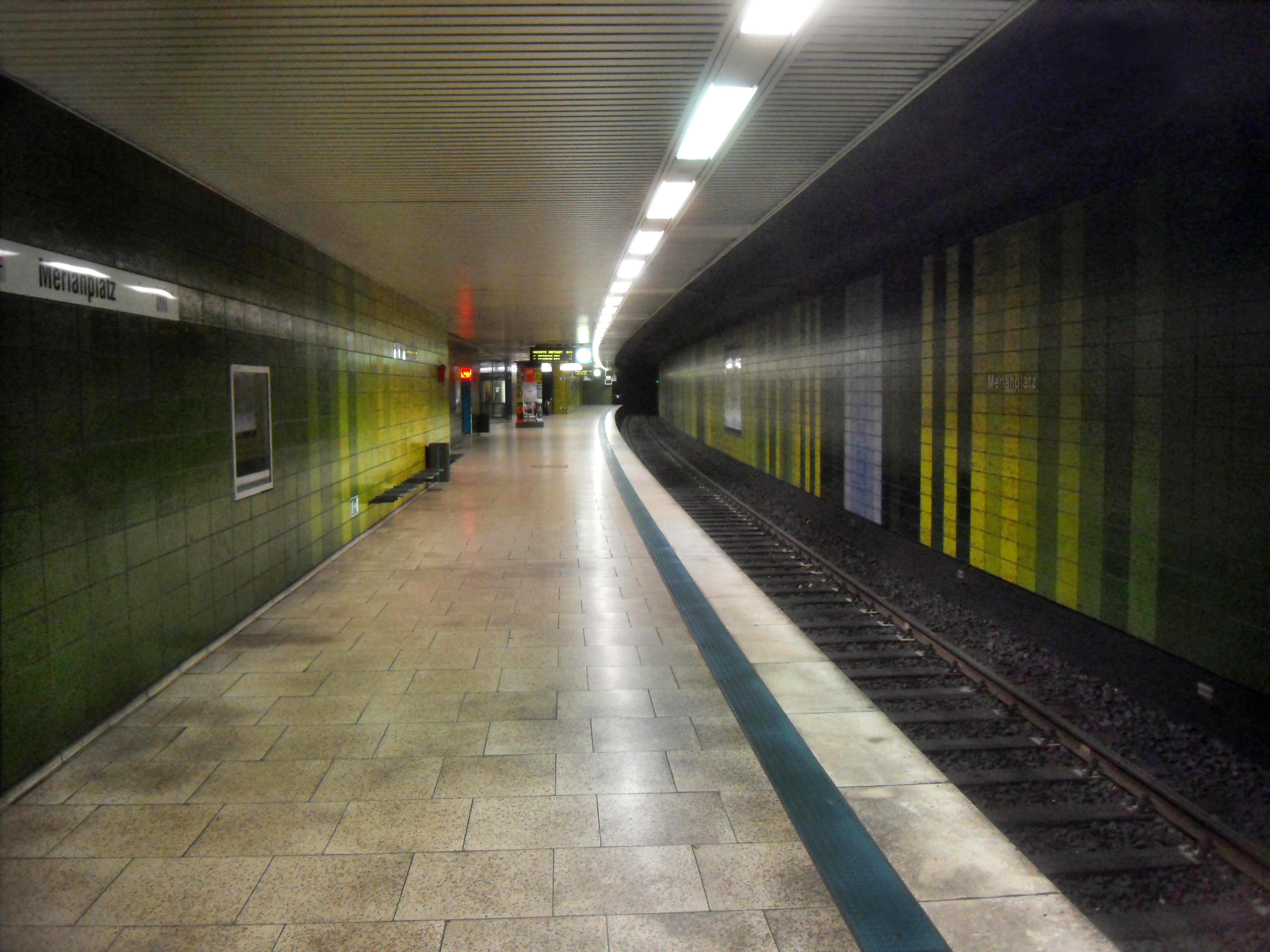 Bahnsteig der D-Ebene des U-Bahnhofs Merianplatz (Richtung Bockenheimer Warte) der U-Bahn Frankfurt auf der Linie U 4 in Hessen (Deutschland)